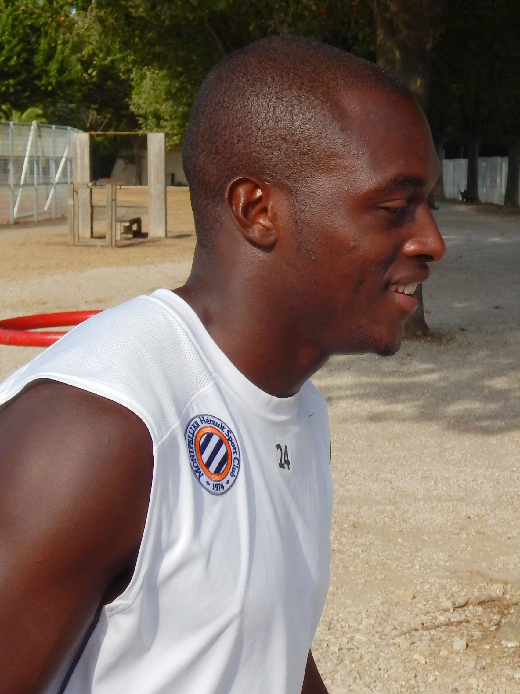 Jérôme Roussillon (Montpellier), 2016.